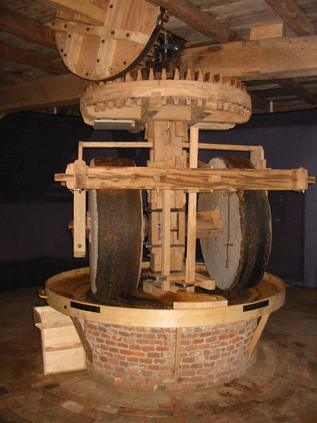 Kantstenen in de ros-oliemolen van het Openluchtmuseum te Arnhem.